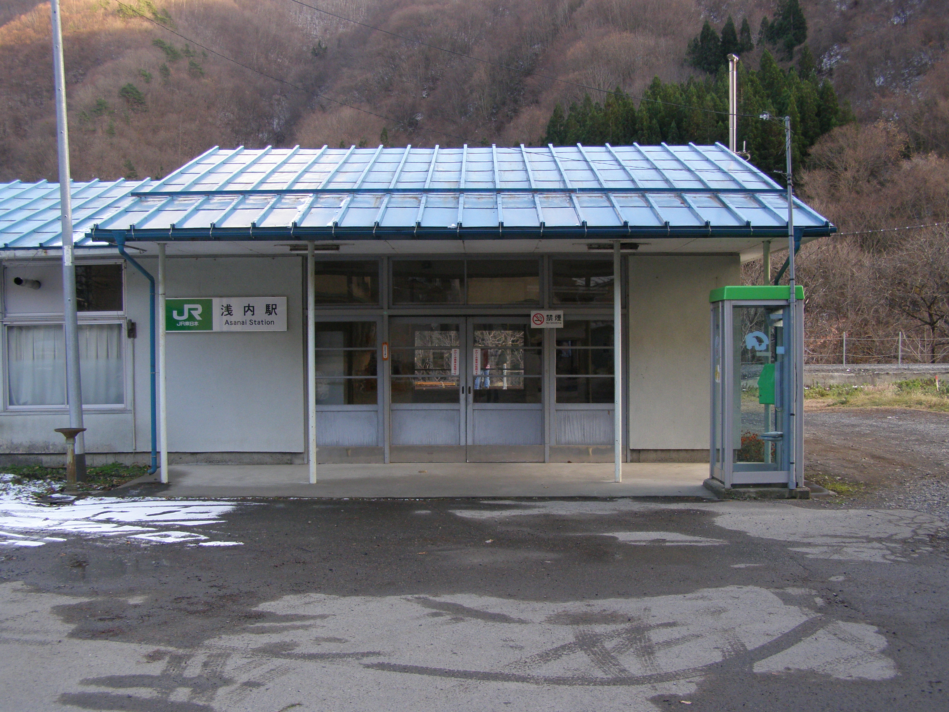 Asanai Station, Iwaizumi, Iwate, Japan